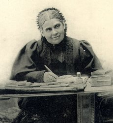 Lucie Berger (1836-1906)